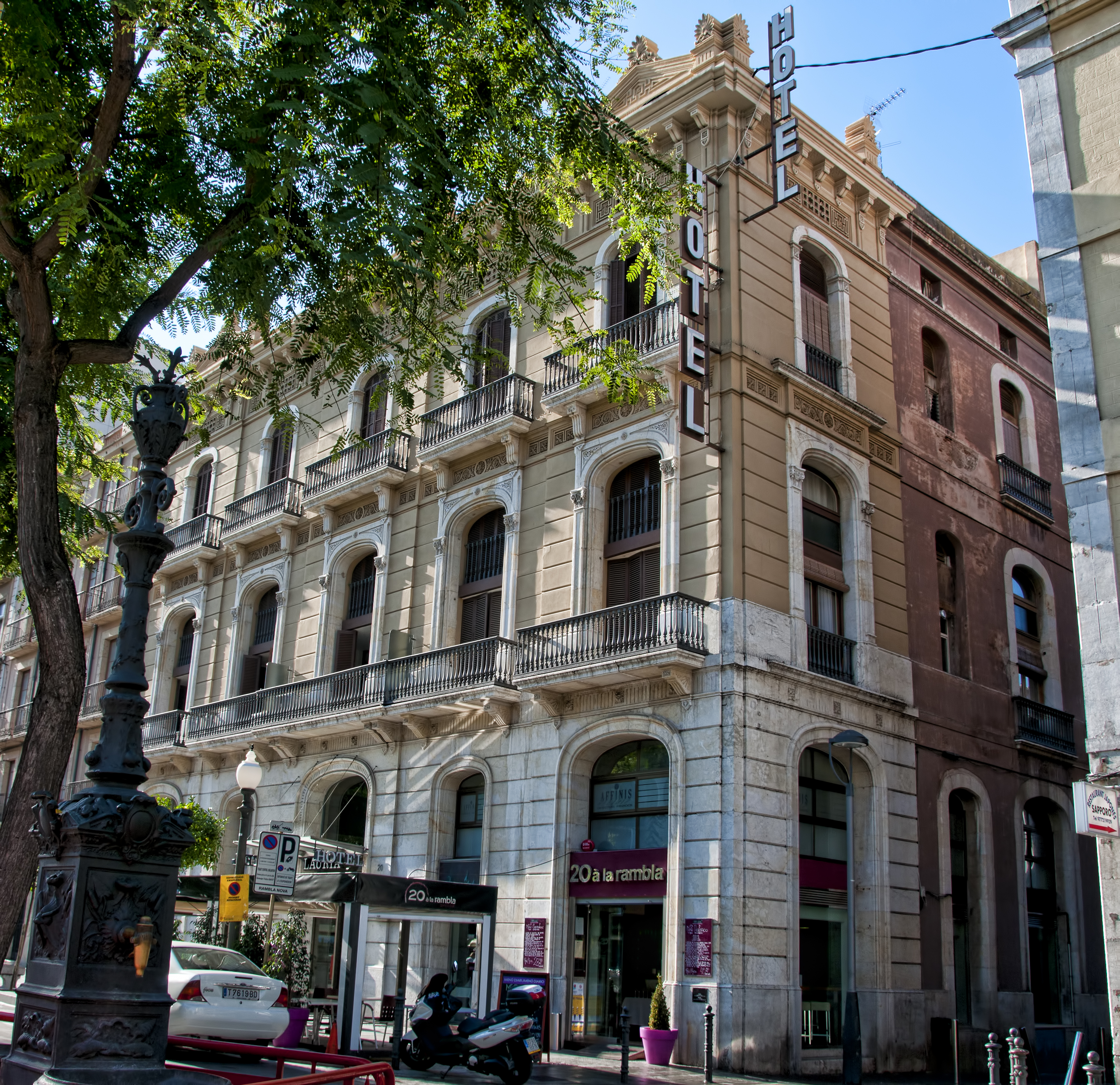 Hotel Lauria. Tarragona